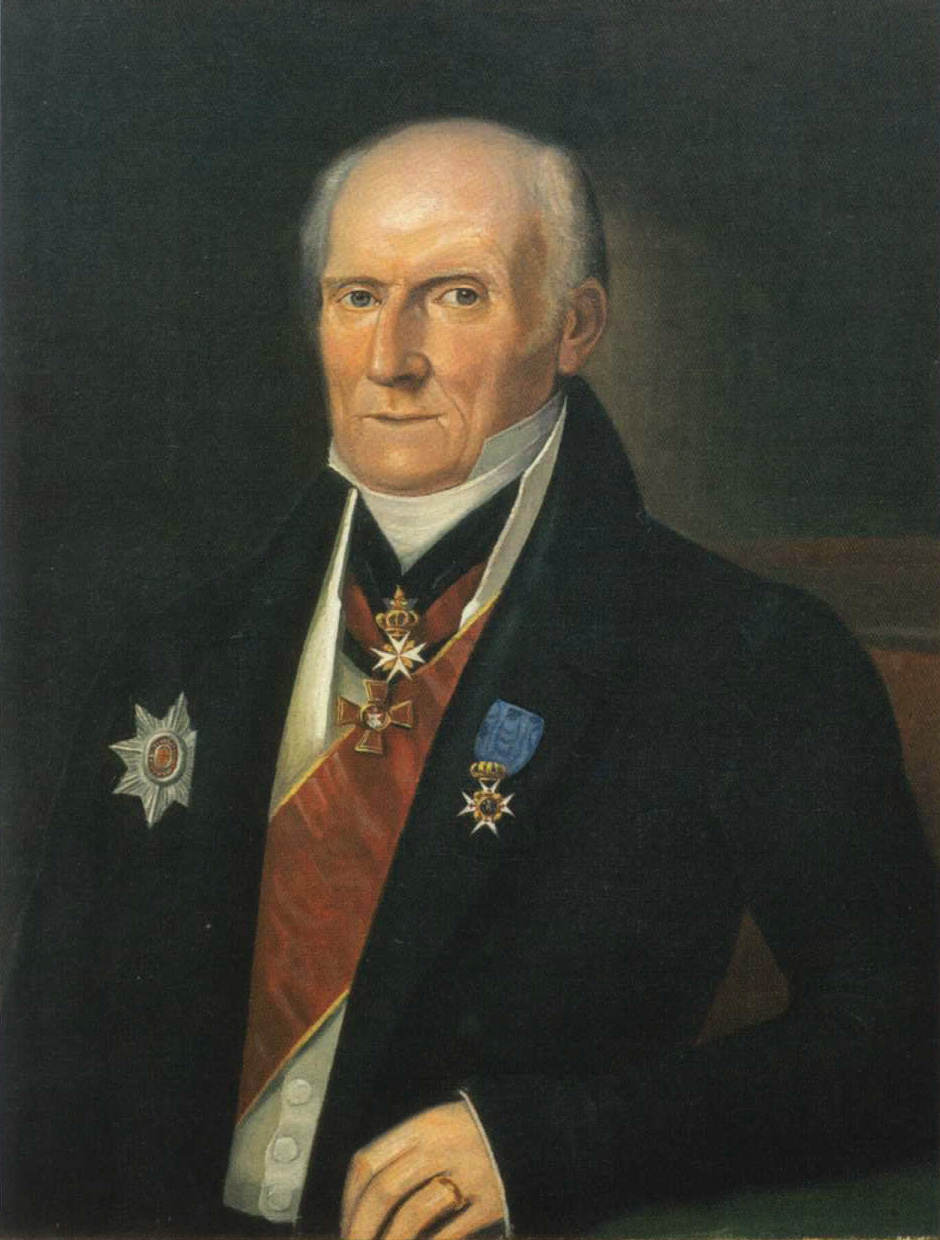 Portrait of Johan Albrecht Ehrenström.